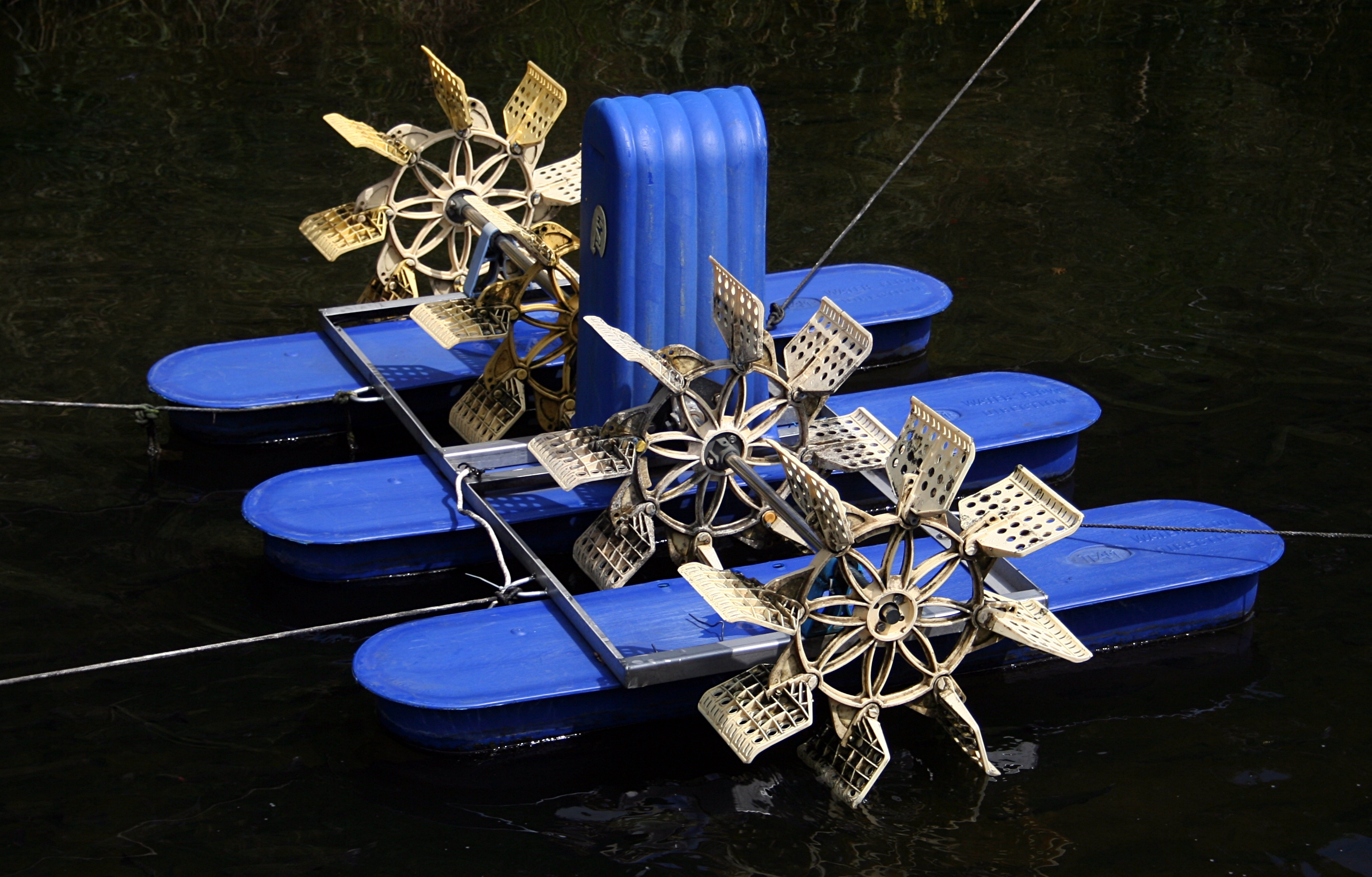 Zaborski Park Krajobrazowy, napowietrzacz przy hodowli pstrąga w pobliżu leśnictwa Laska